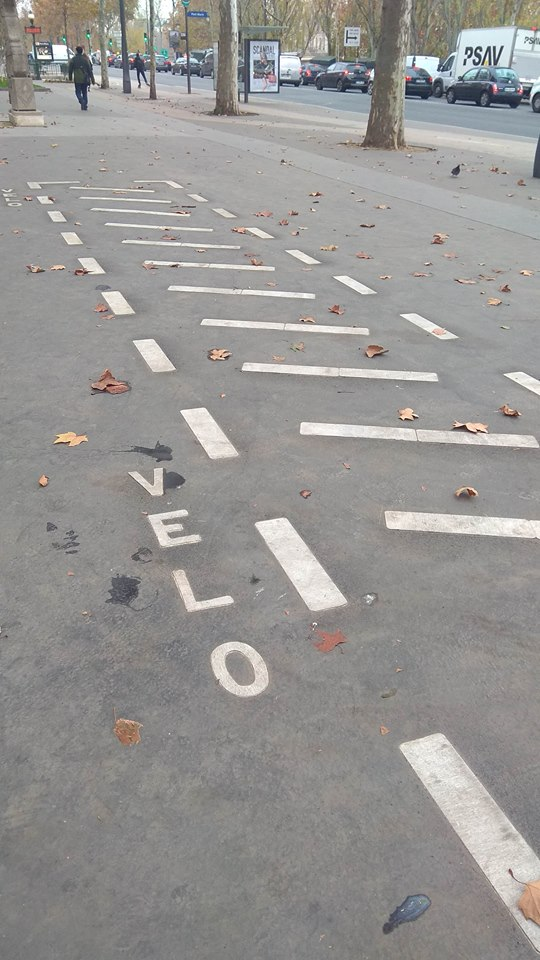 Il s'agit de places de stationnement pour vélos en free-floating à Paris, en 2018.